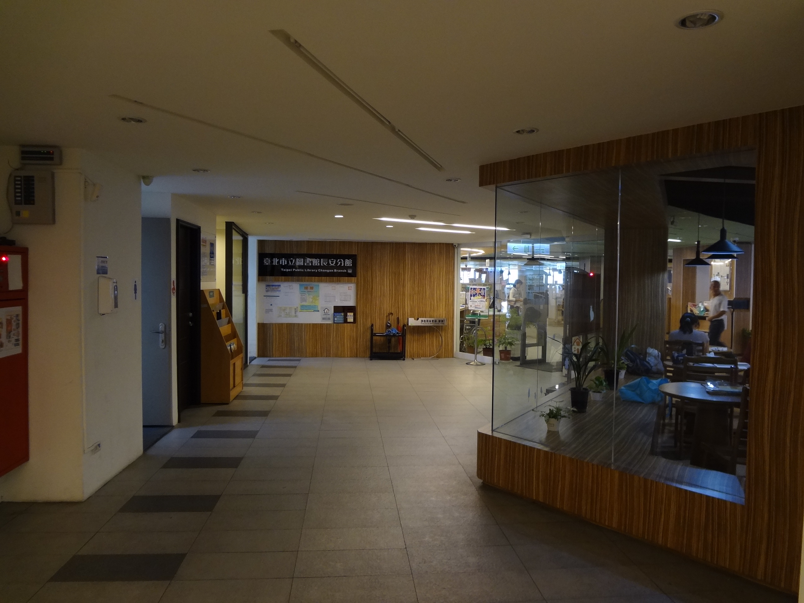 臺北市立圖書館長安分館。